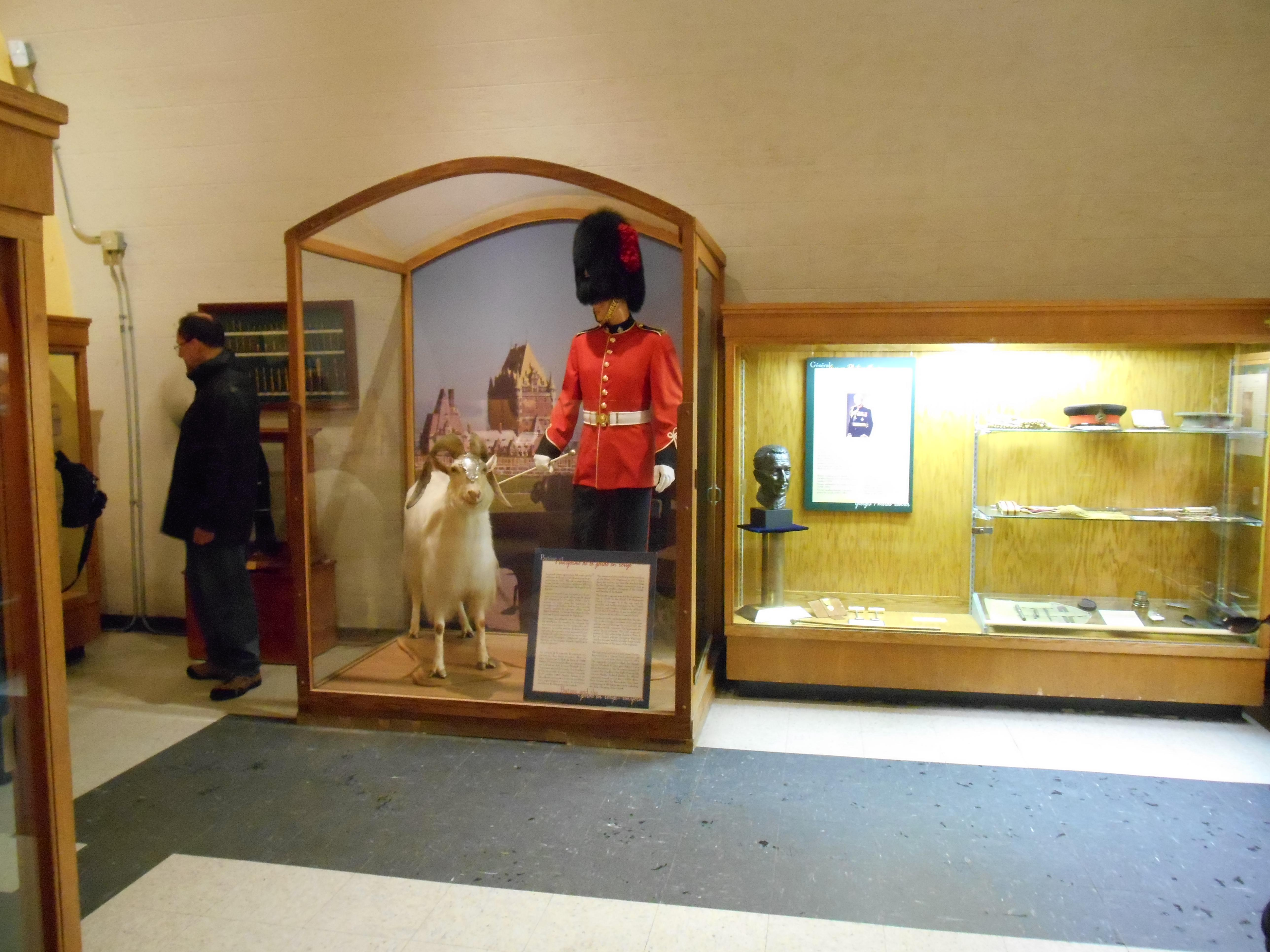 Musée du Royal 22e Régiment, Citadelle de Québec